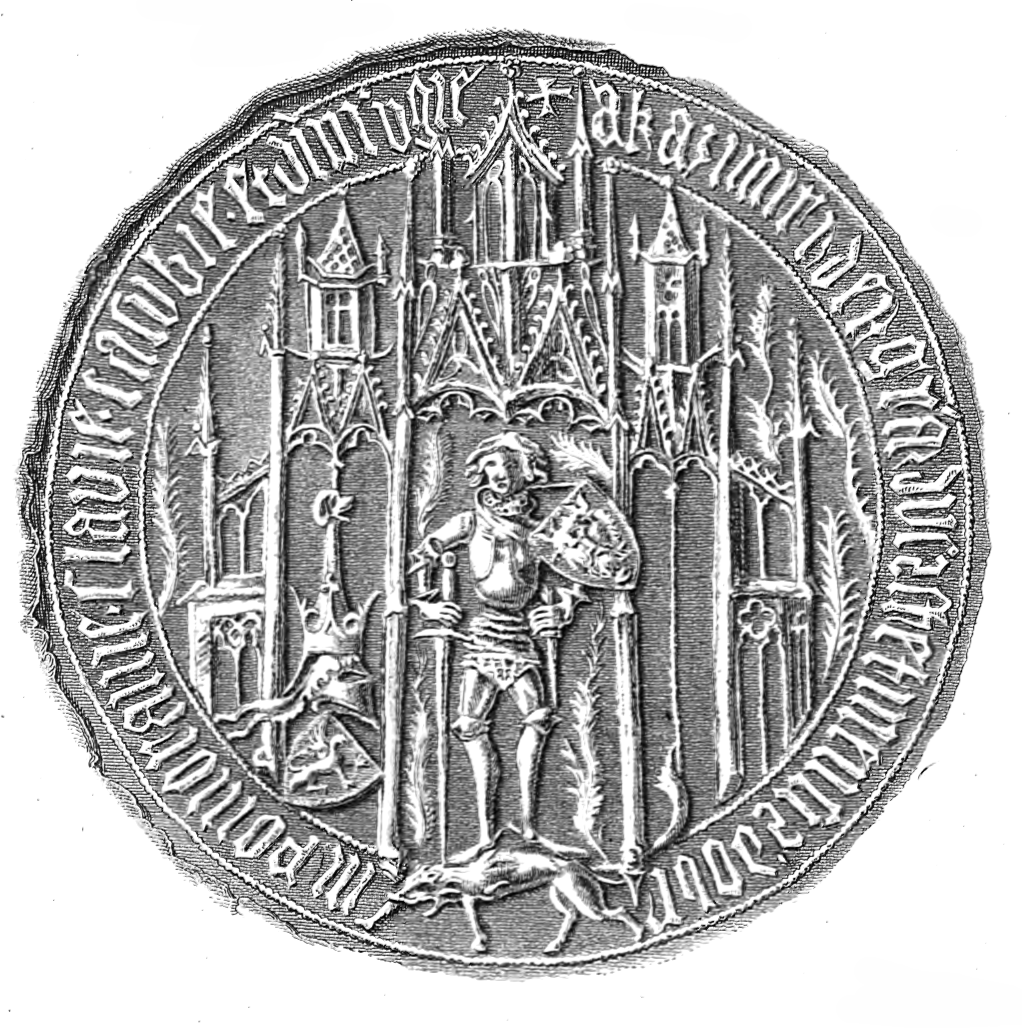 Kaźko IV Słupski seal